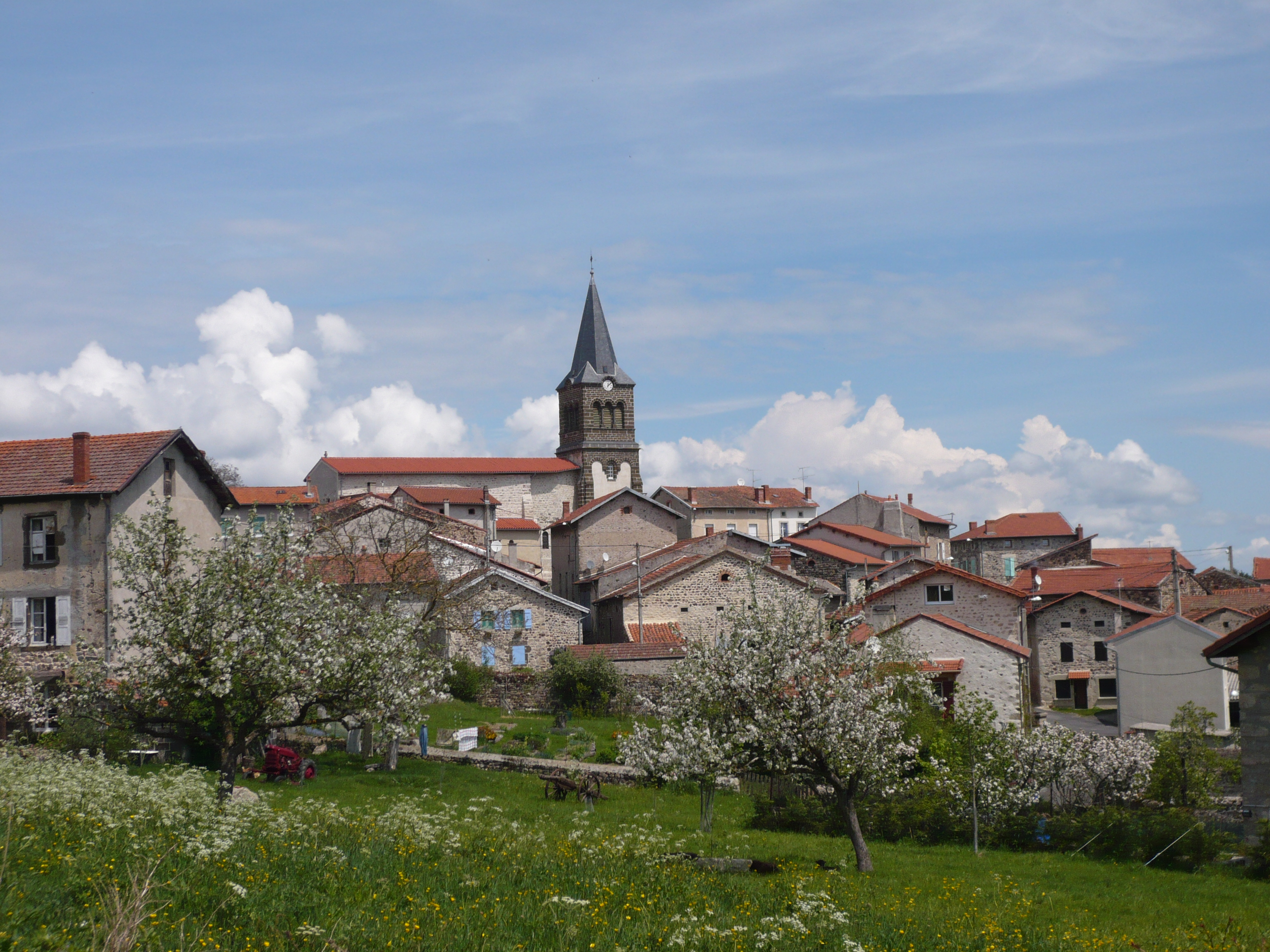 Village auvergnat en Haute-Loire : Vernassal